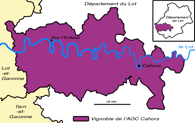 Carte du vignoble AOC Cahors